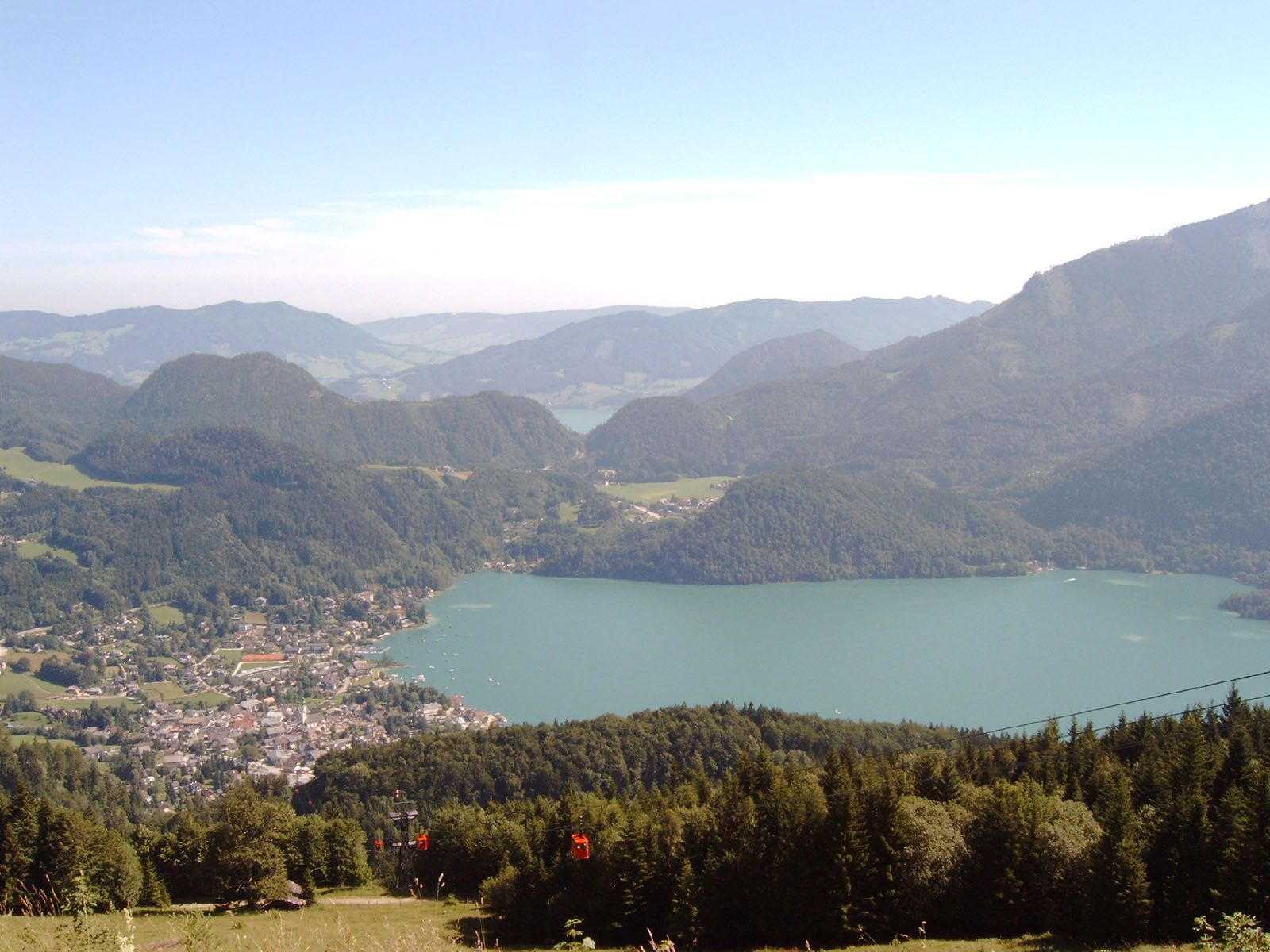 Blick von der Lärchenhütte auf St. Gilgen und Wolfgangsee.Im Hintergrund Mitte oben der Mondsee.